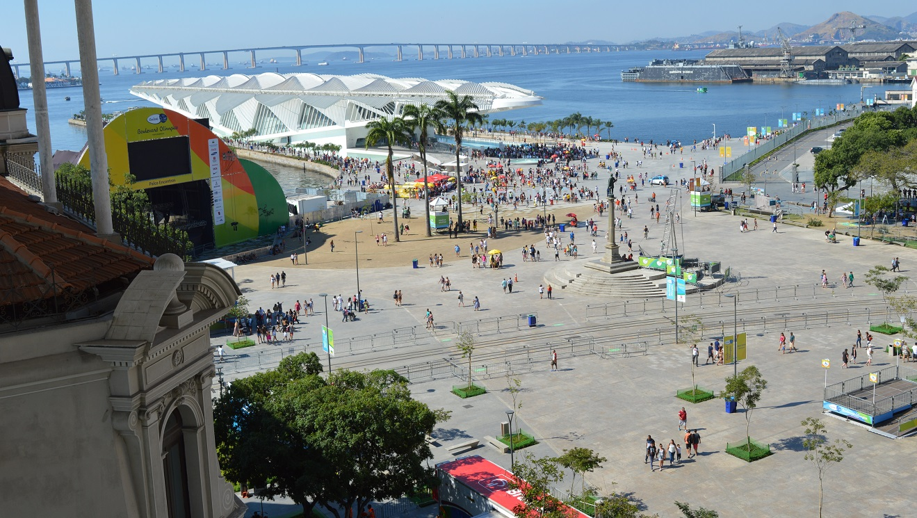 リオ五輪のために再開発された「すてきな港」のマウア広場